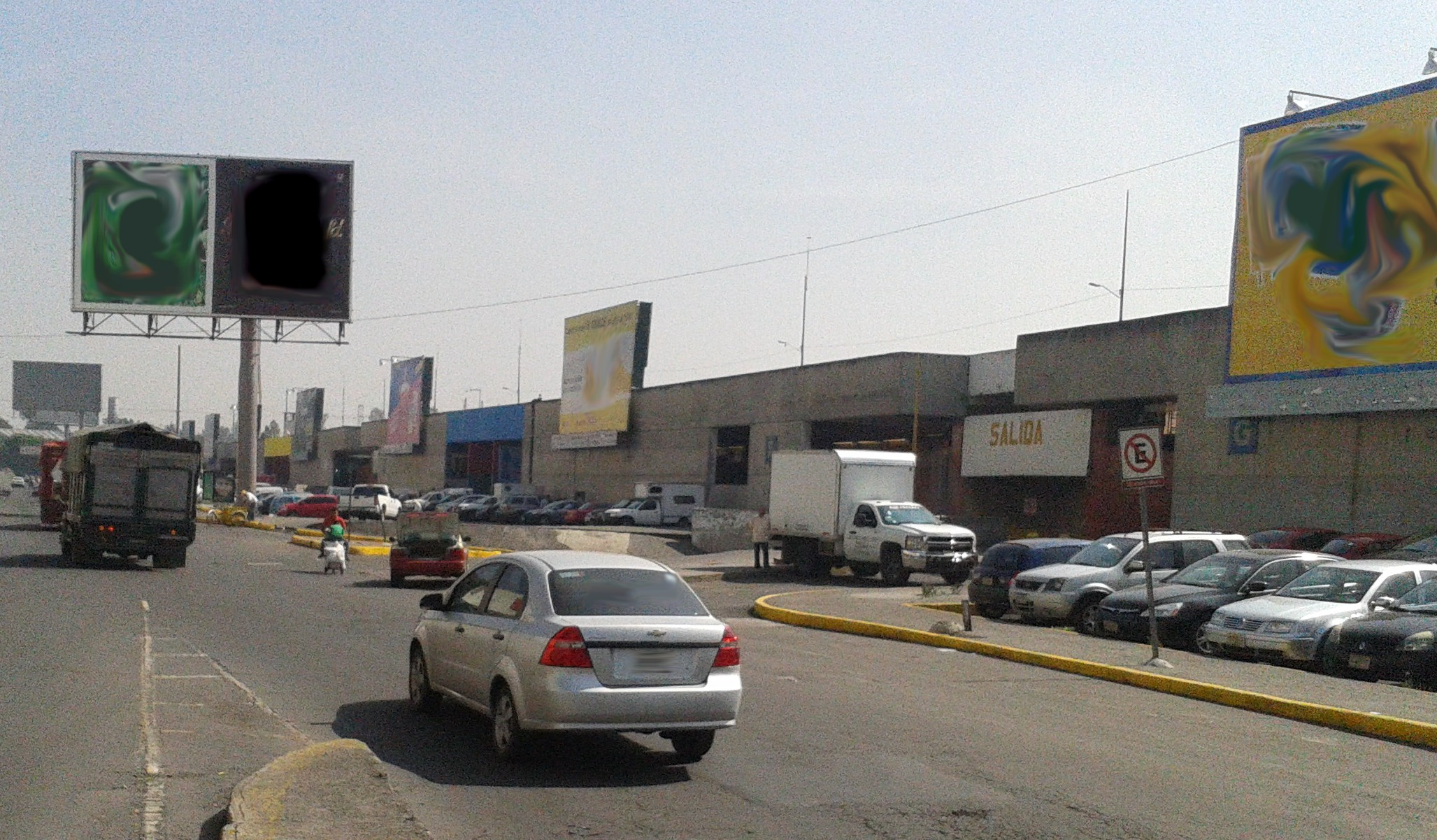 Vista del exterior de la zona de abarrotes de la Central de Abastos de la Ciudad de México (recorte).